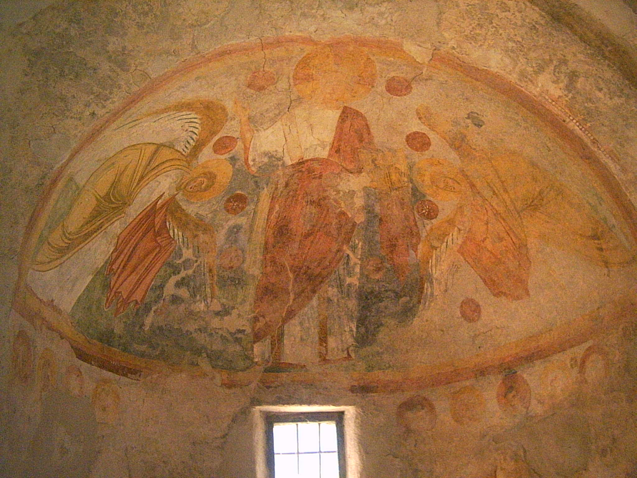 affreschi interni di san fedelino